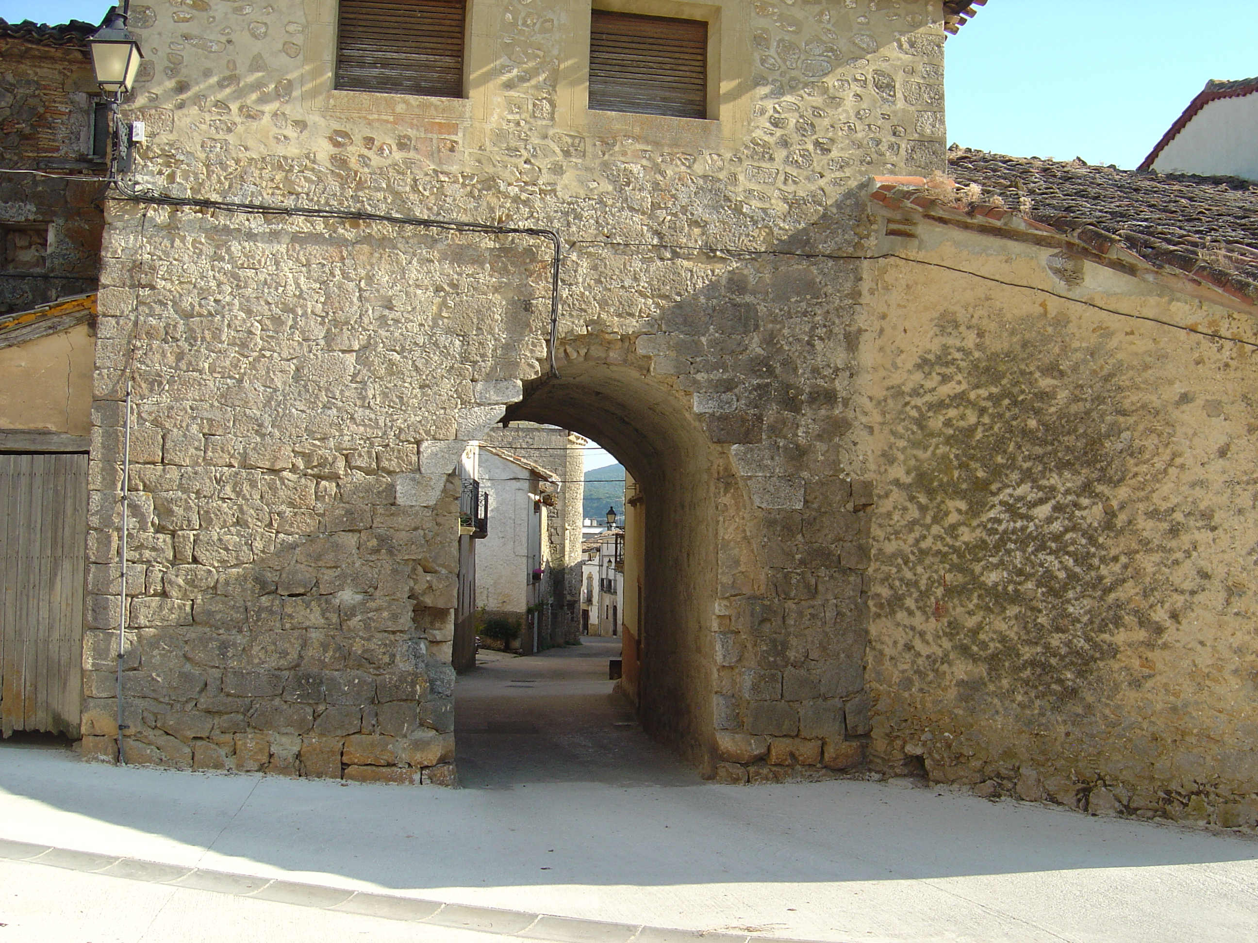 Zúñiga. Navarra. Spanien. Llegando desde Barabia